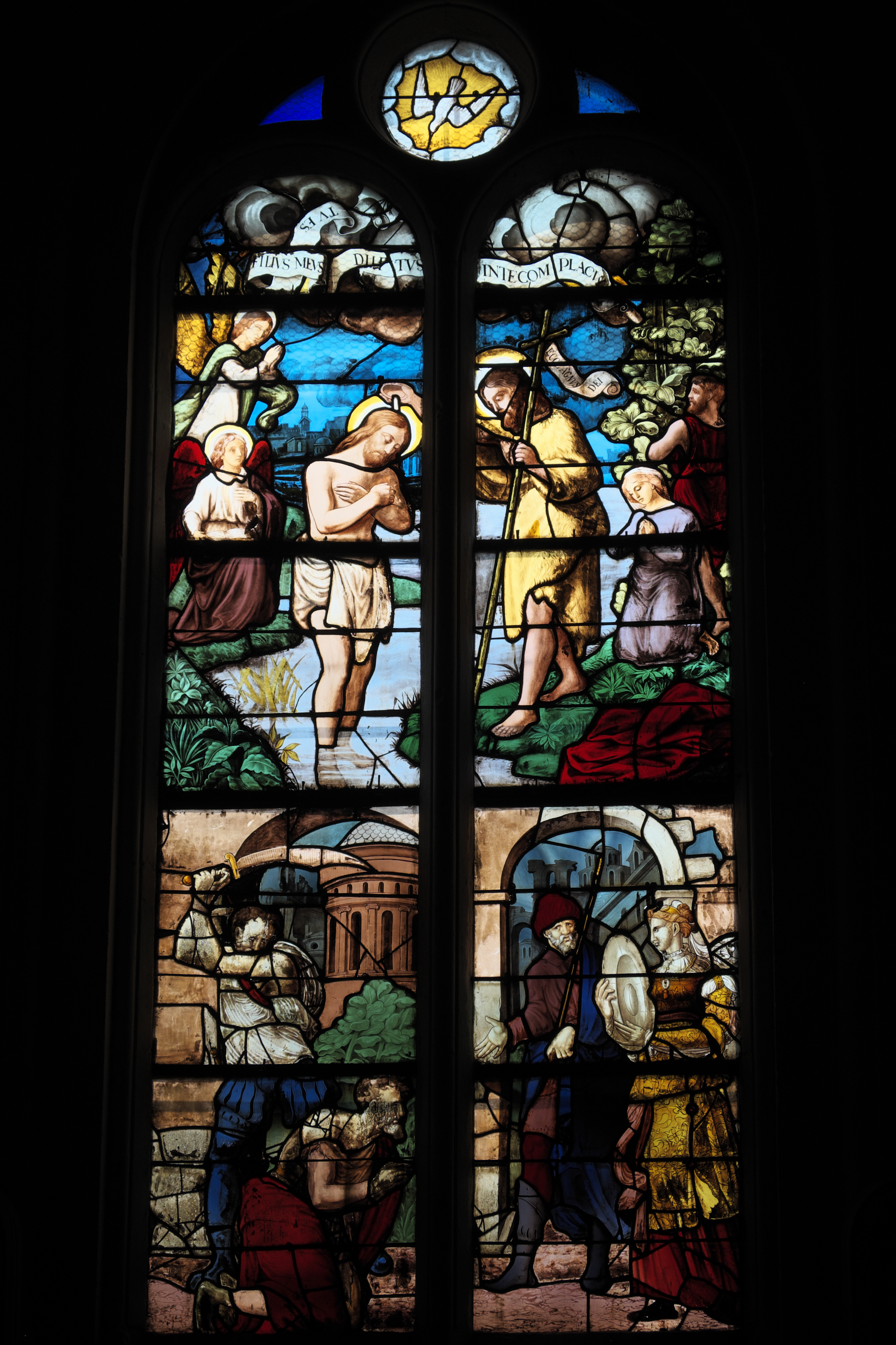 Katholische Pfarrkirche Saint-Martin in Triel-sur-Seine im Département Yvelines (Île-de-France/Frankreich), Bleiglasfenster (n° 6) aus dem 16. Jahrhundert; Darstellung: Taufe Jesu (oben), Enthauptung des Johannes des Täufers (unten)